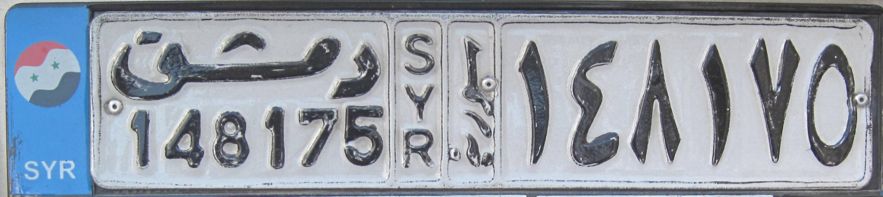 kentekenplaat Syrië 2